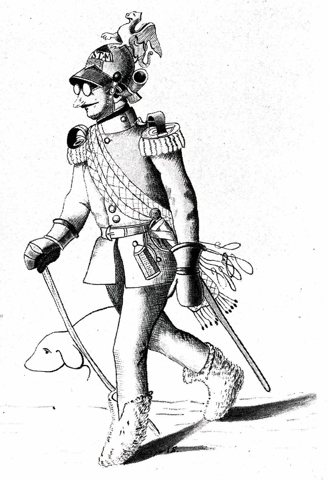 Vuonna 1850 ilmestynyt pilakuva Johan Mauritz Nordenstamista.